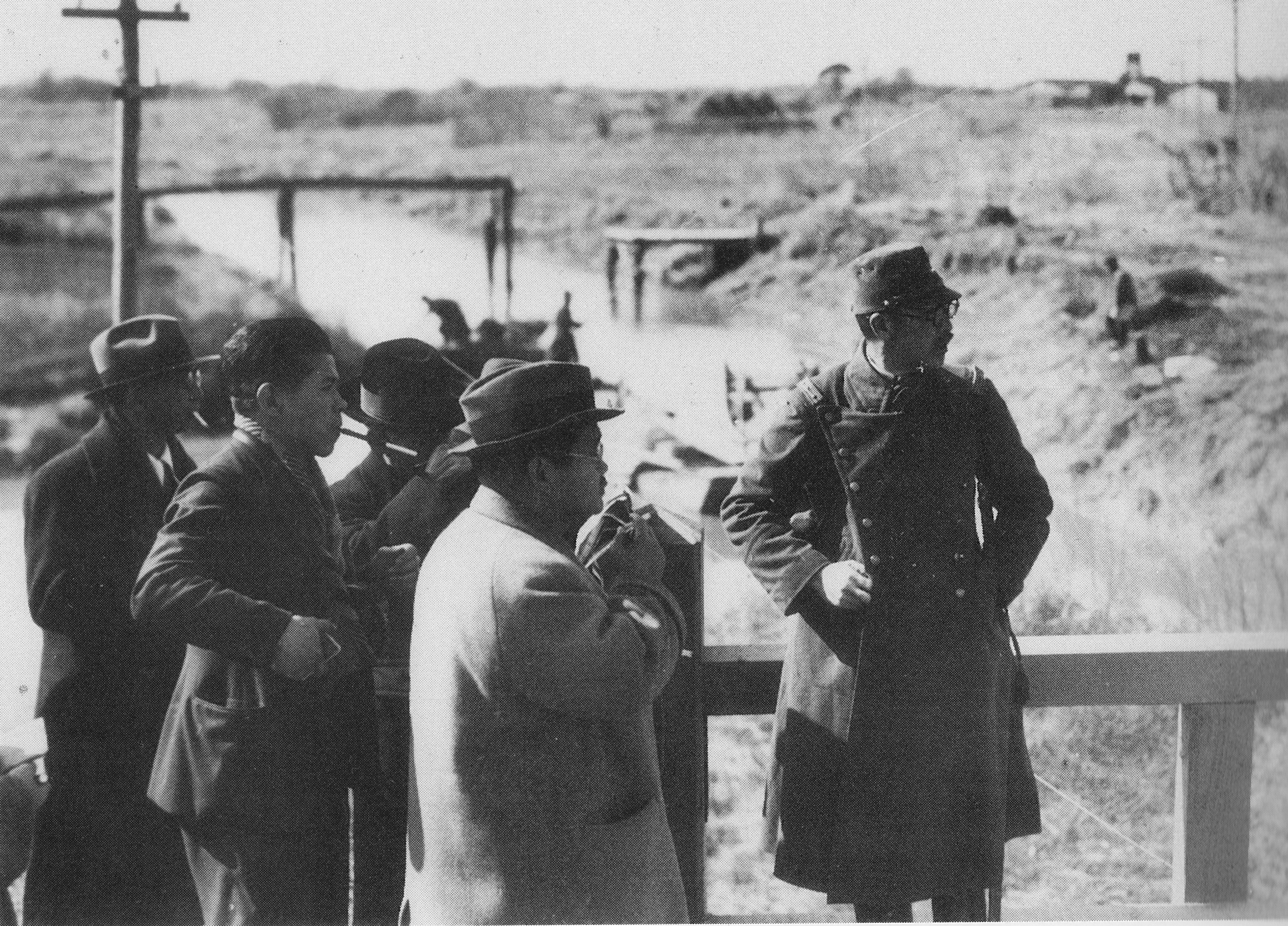 大陸で取材中の菊池寛（中央）。右は細見惟雄大佐。